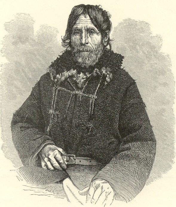 "PEASANT OF THE VILLAGE OF PANOVTZI PODOLIA". 'Nouvelle Geographie Universelle La Terre et les Hommes V : L' Europe Scandinave, Russe etc.' by Jacques Elisee Reclus, published in Paris by Hachette & Cie., 1880